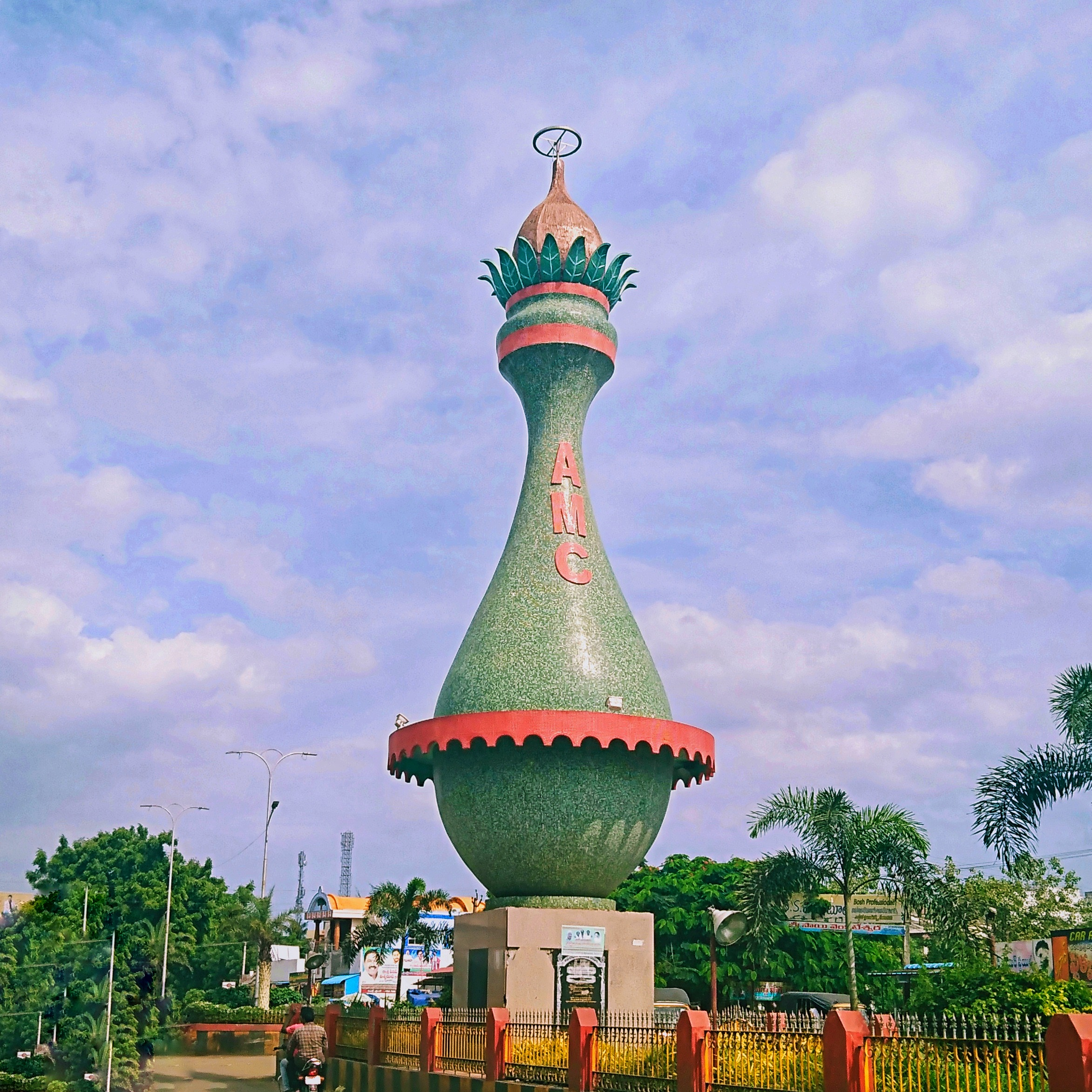 అమలాపురం ల్యాండ్ మార్క్, శుభ కలశం